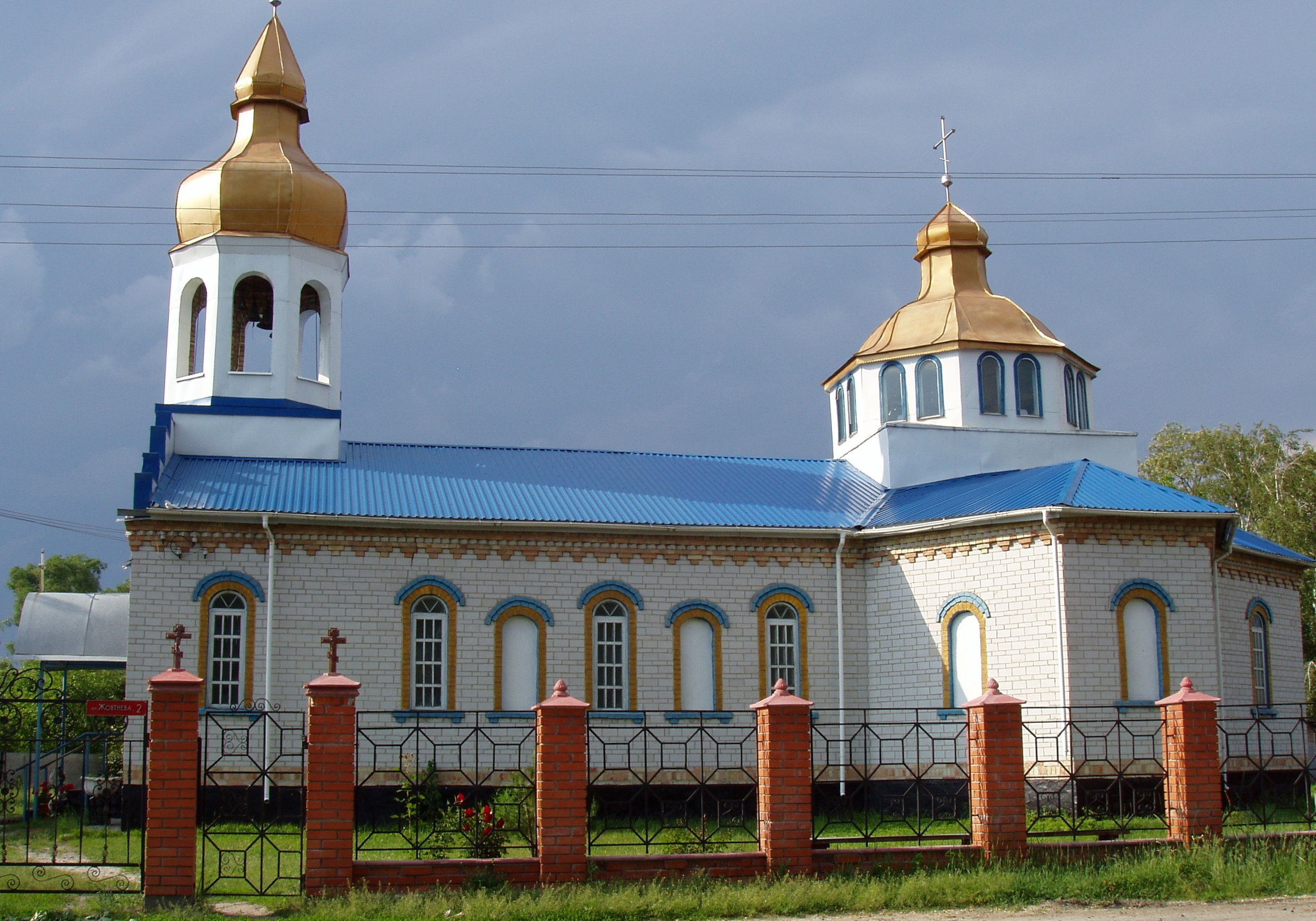 Свято-Миколаївська церква у селі Гнідин Бориспільського району (Київська область, Україна), вул. Леніна 91